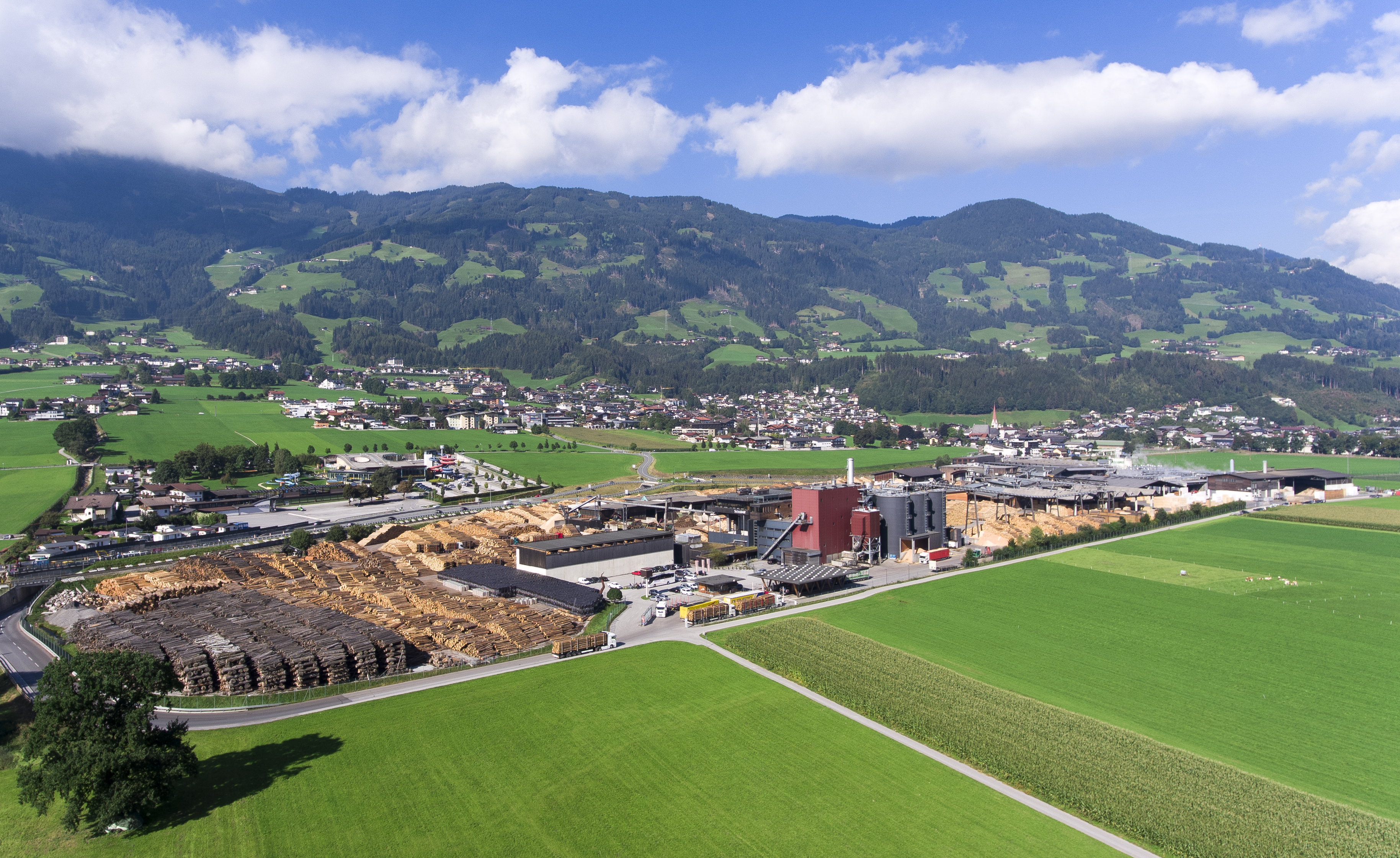 Standortbild Fügen